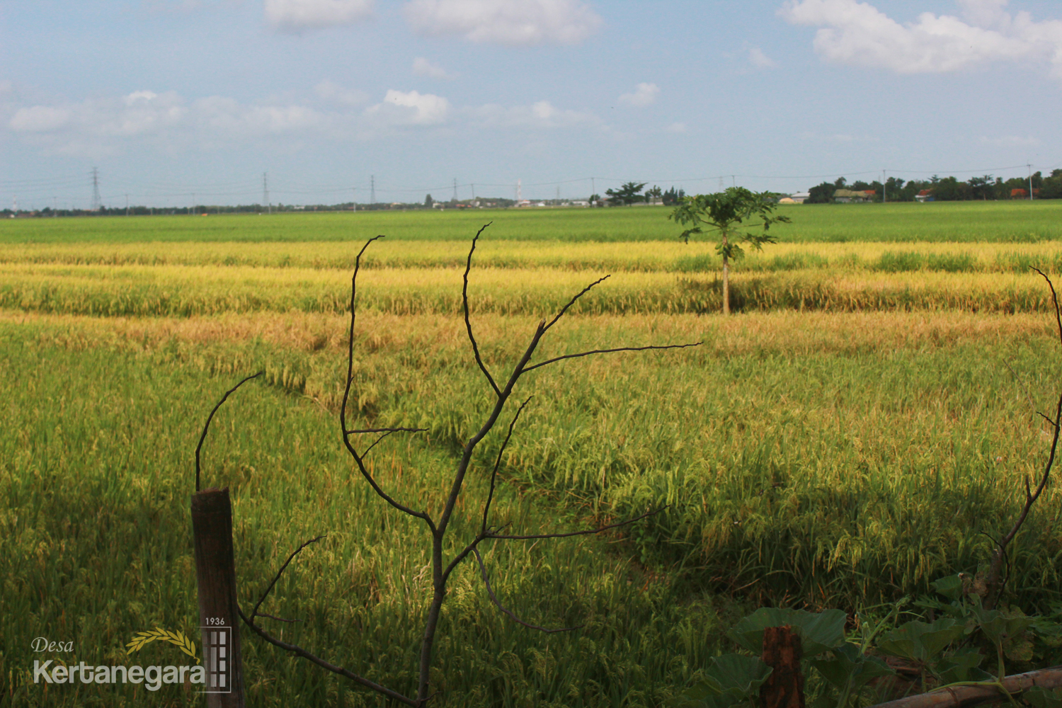 Area Pesawahan Kertanegara